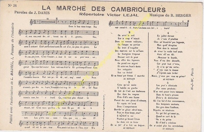 Une célèbre chanson.